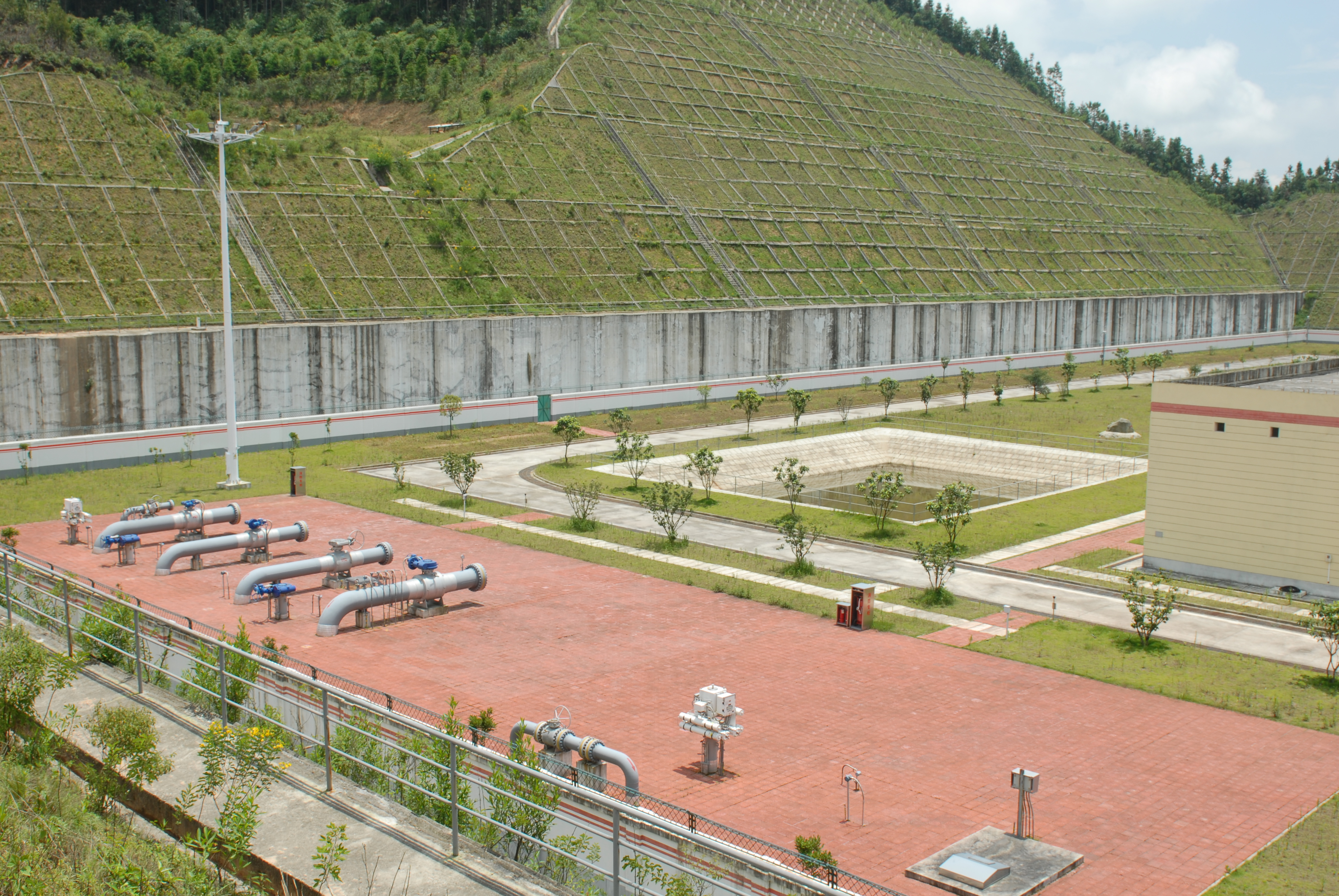 中缅油气管道工程龙陵分输（泵）站